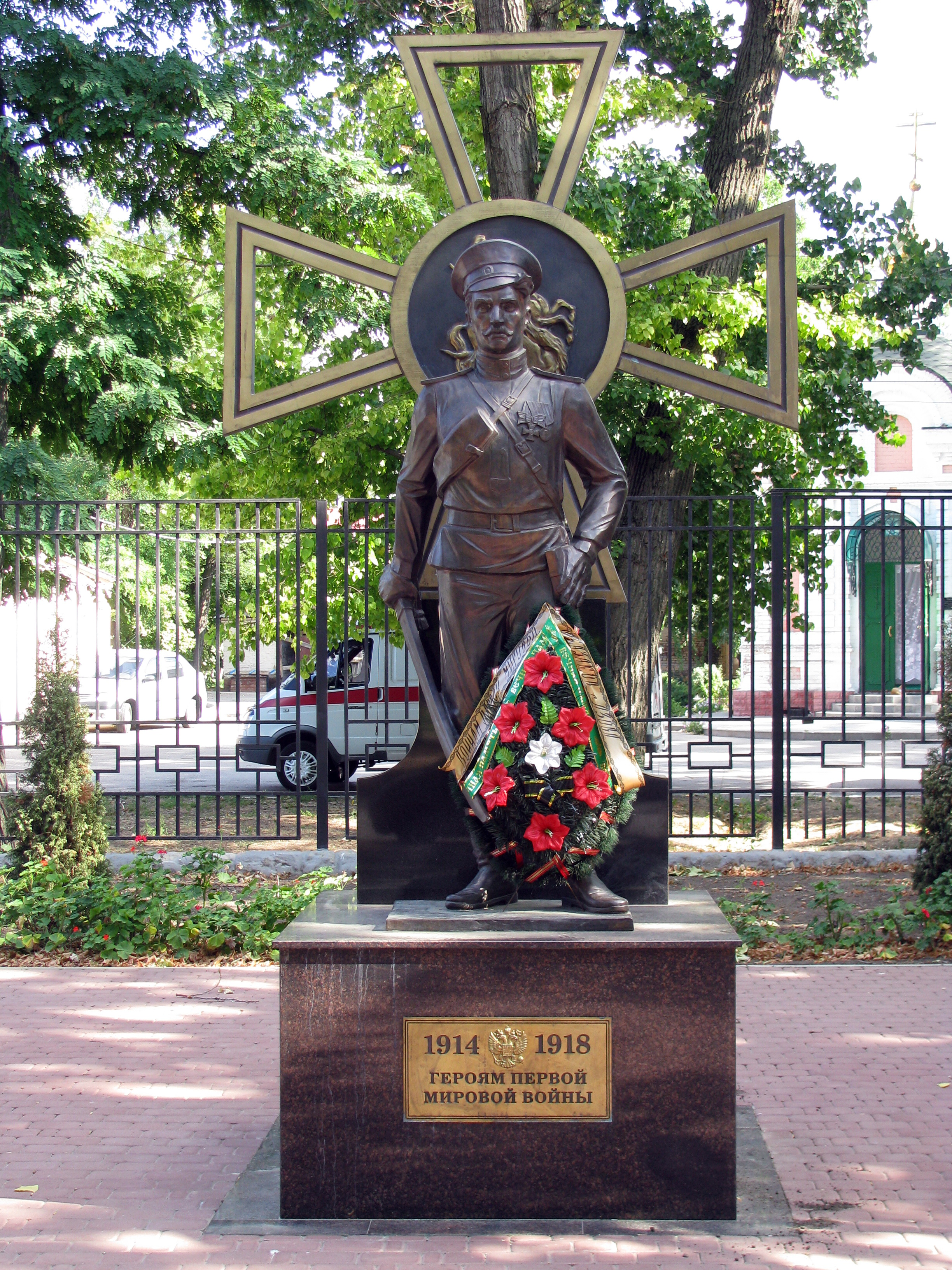 Мемориал героям первой мировой войны в Азове, Петровский бульвар.